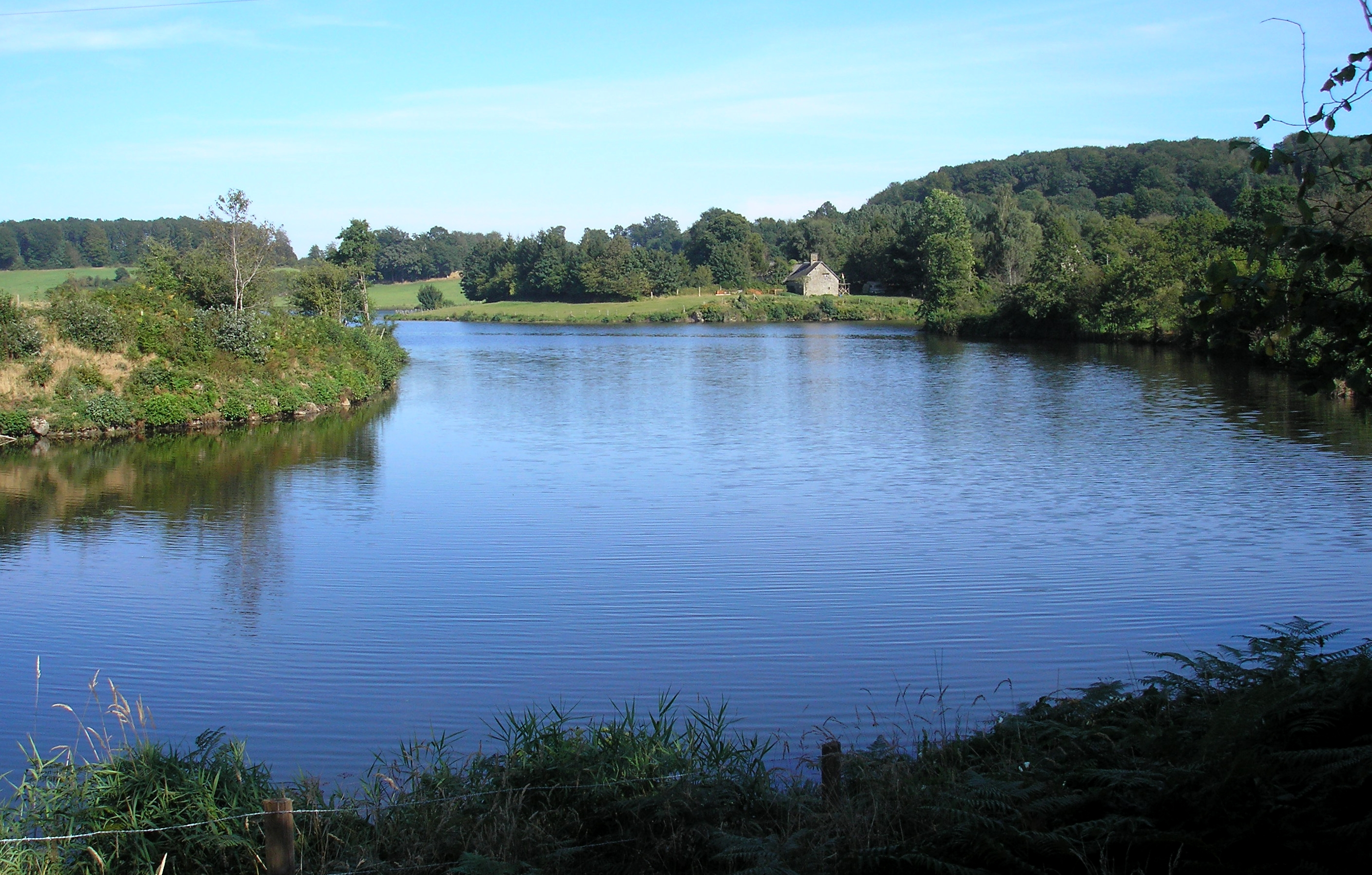 L'étang de la Visance entre Landisacq, à gauche, et Chanu, à droite (Normandie, France).